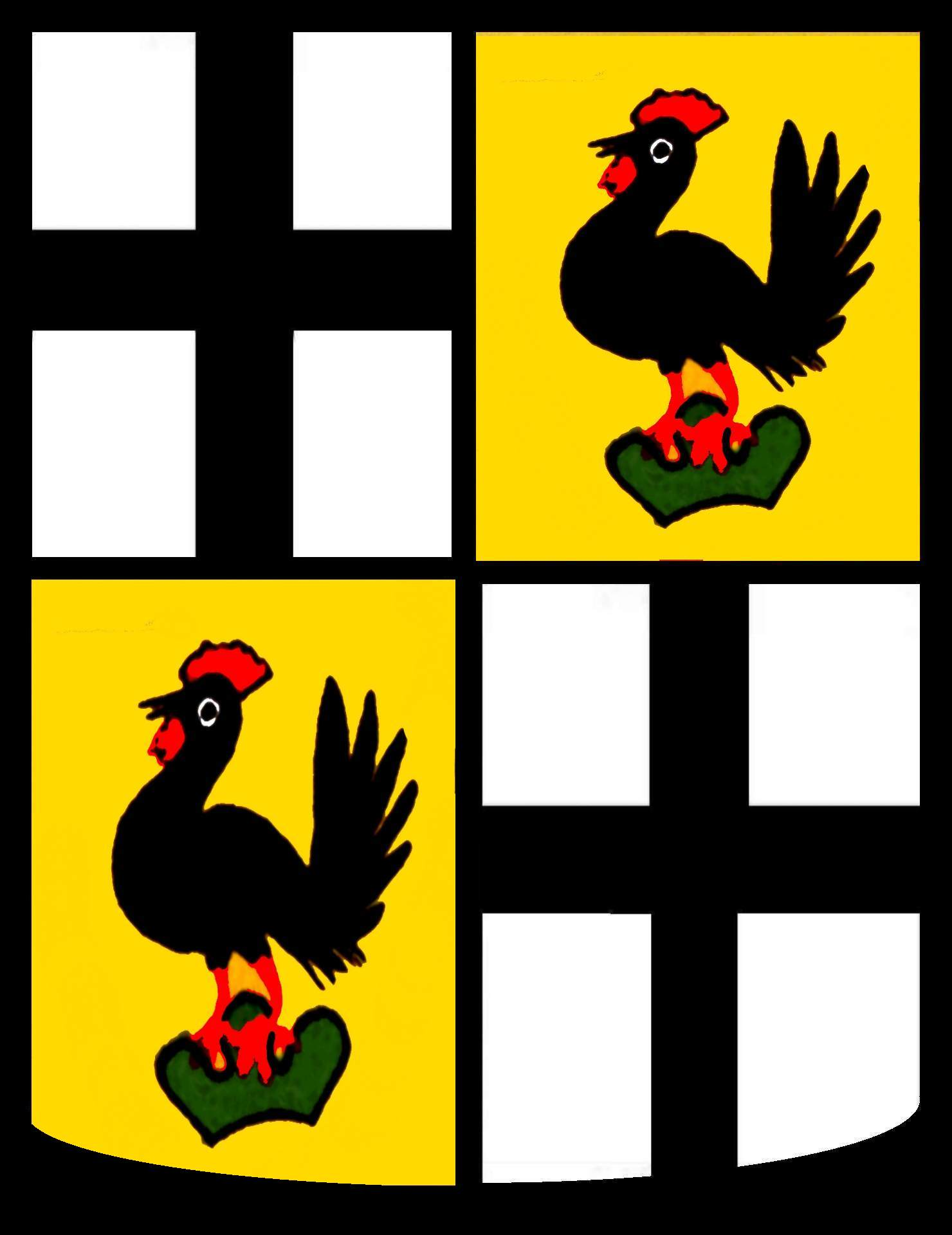 Wappen Wilhelm Hartmann von Klauer zu Wohra, Fürstabt von Fulda 1568–1570